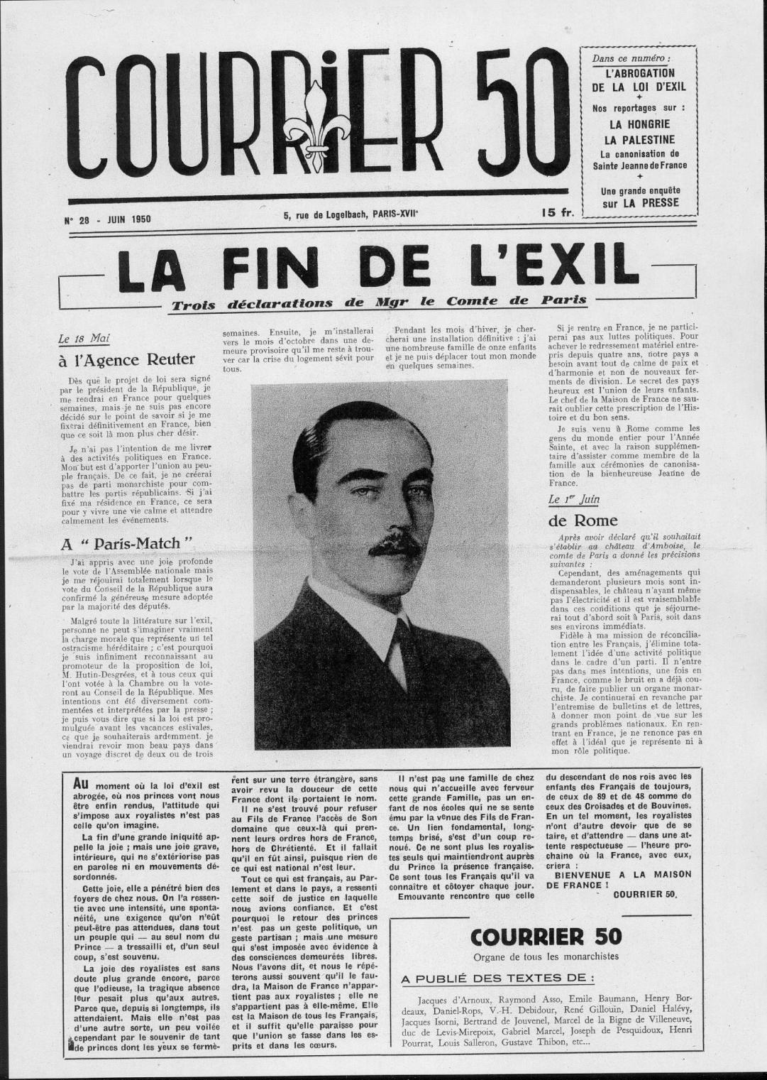 Page Une du Courrier 50 au retour d'exil du Comte de Paris